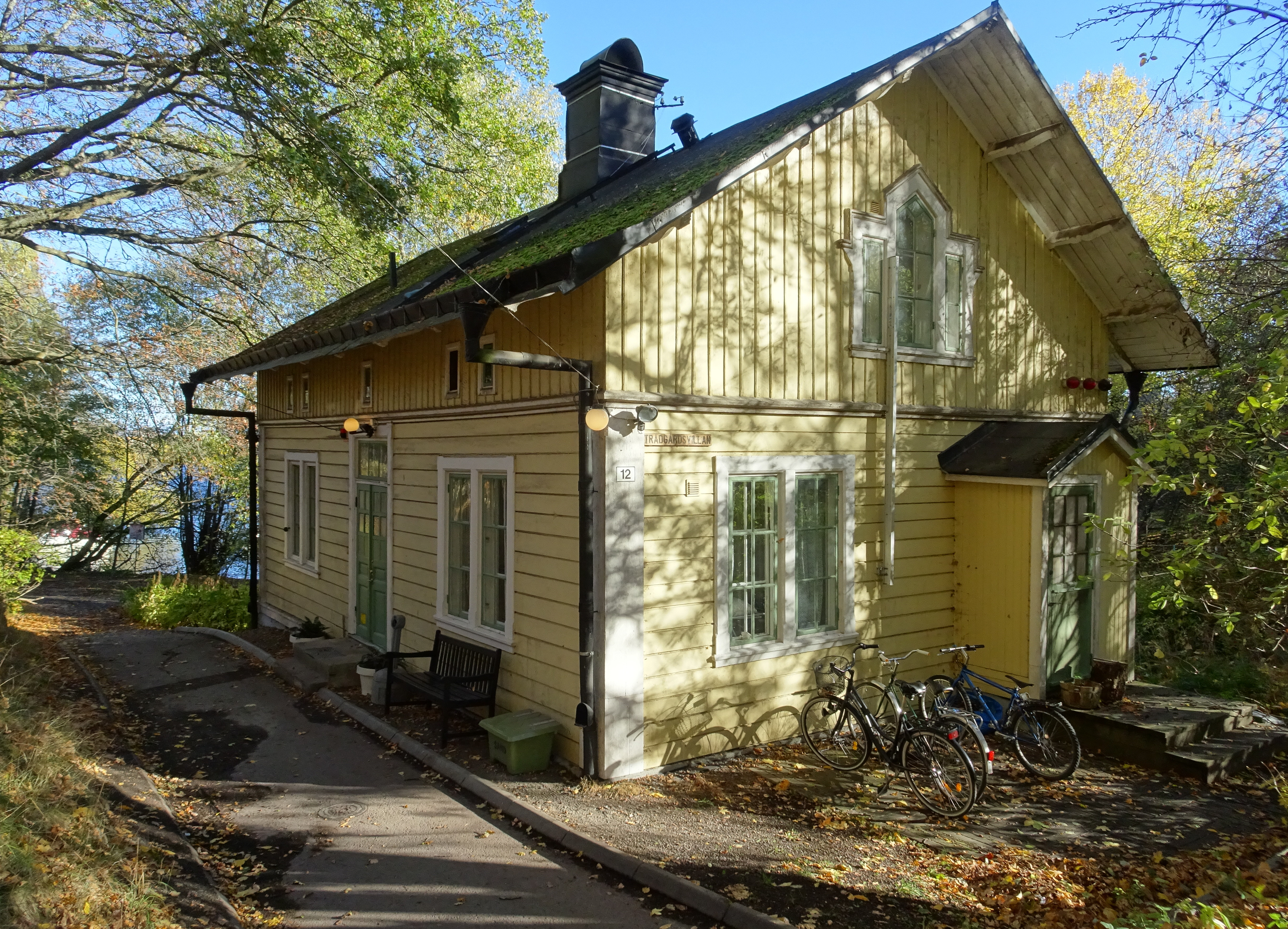 Eolshäll, trädgårdsvillan, 1884, Sommarbostad